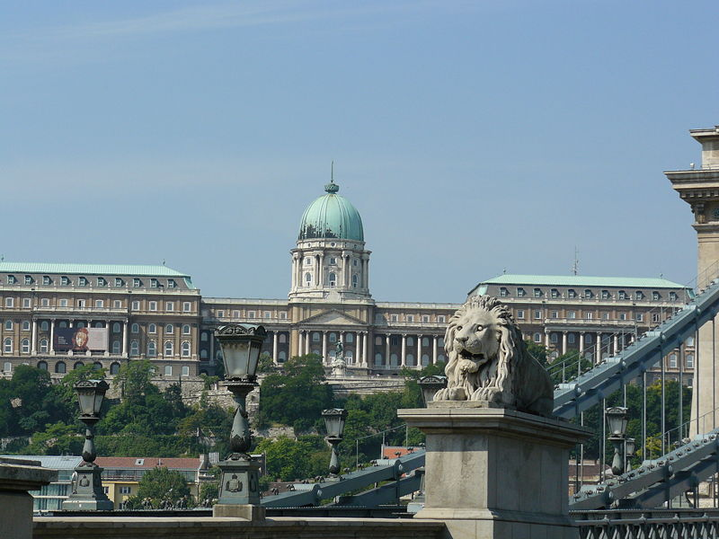 Buda Castle